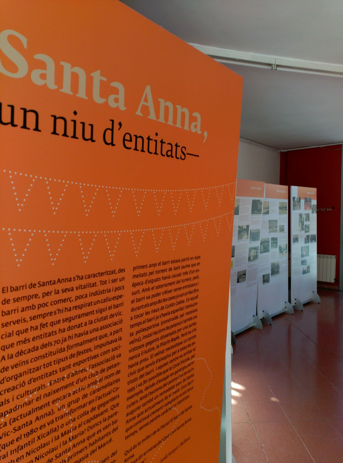 Un niu d'entitats